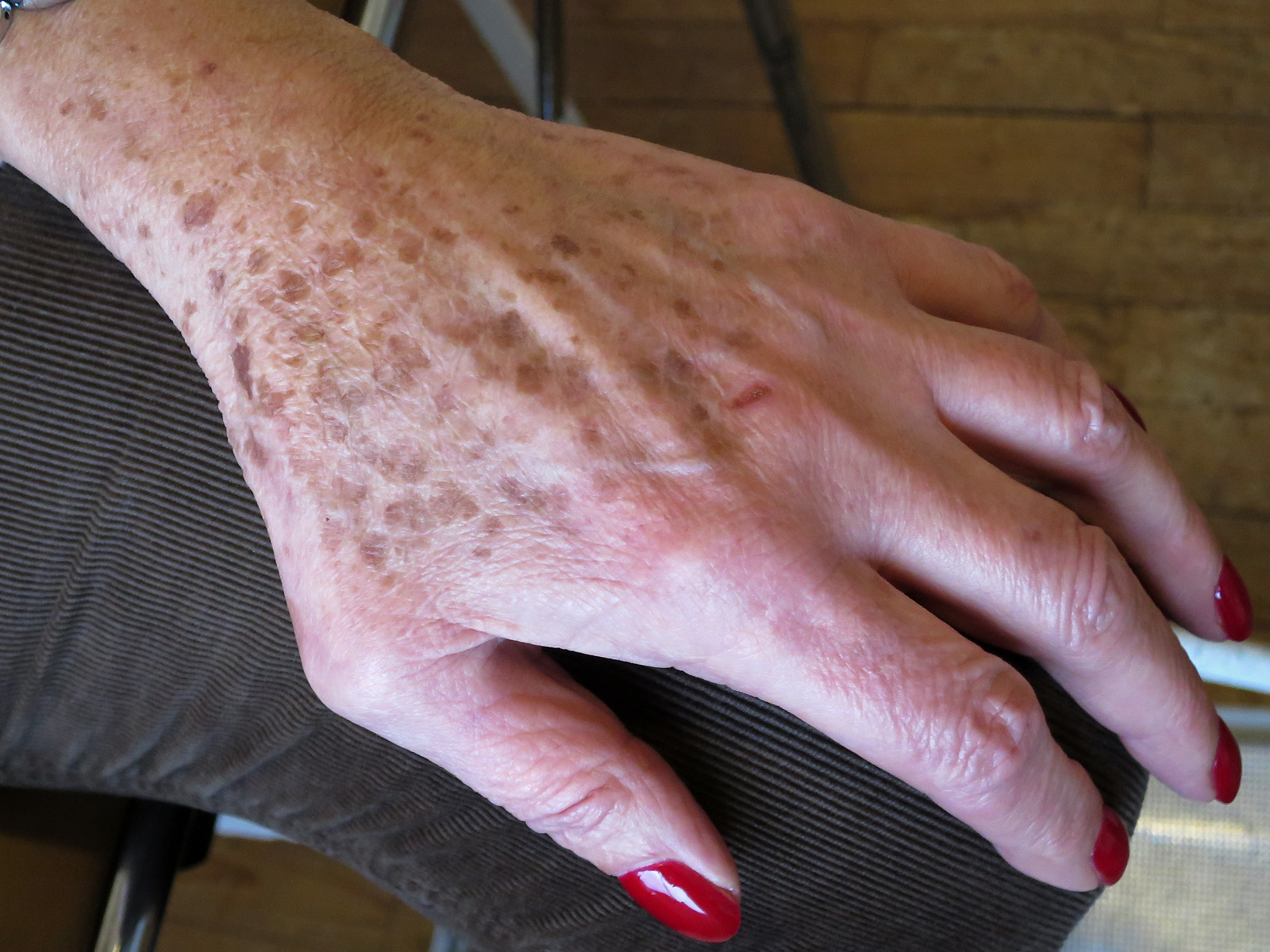 Lentigo sénile sur le dos de la main